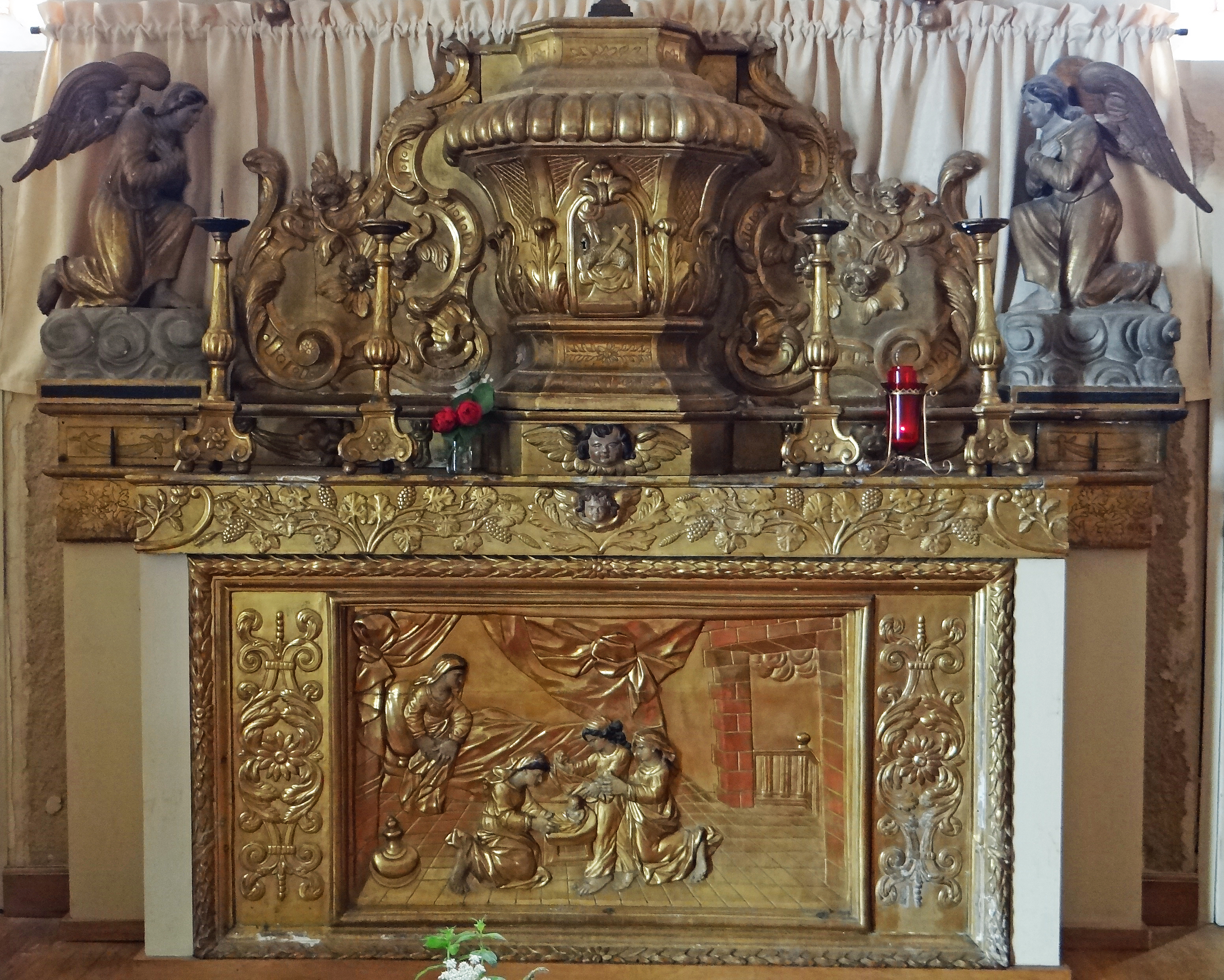 Gourdon - Chapelle Notre-Dame du Majou - Autel avec panneau sculpté sur la "Naissance de la Vierge"